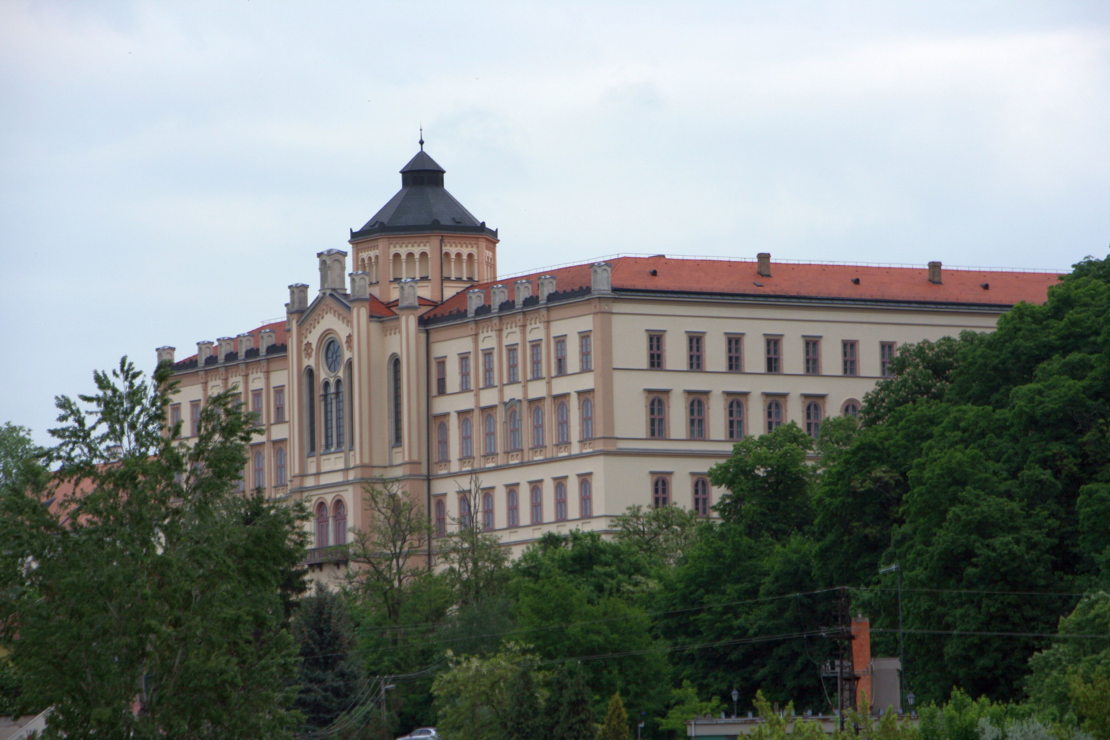 Blick vom Schiff